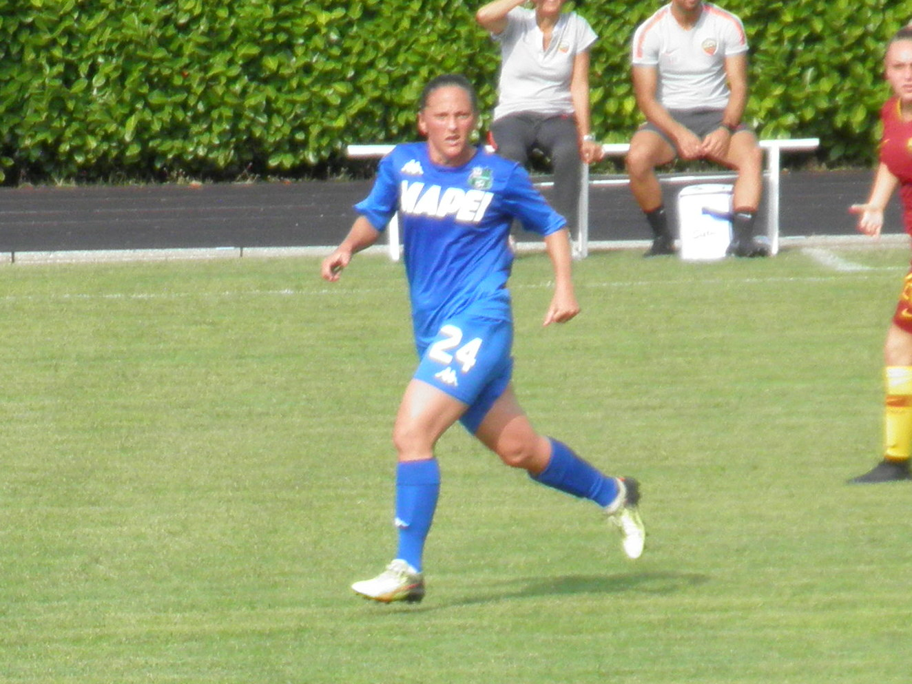 San Polo d'Enza, stadio comunale: Incontro tra il Sassuolo e la Roma, prima giornata di Serie A di calcio femminile della stagione 2018-2019.